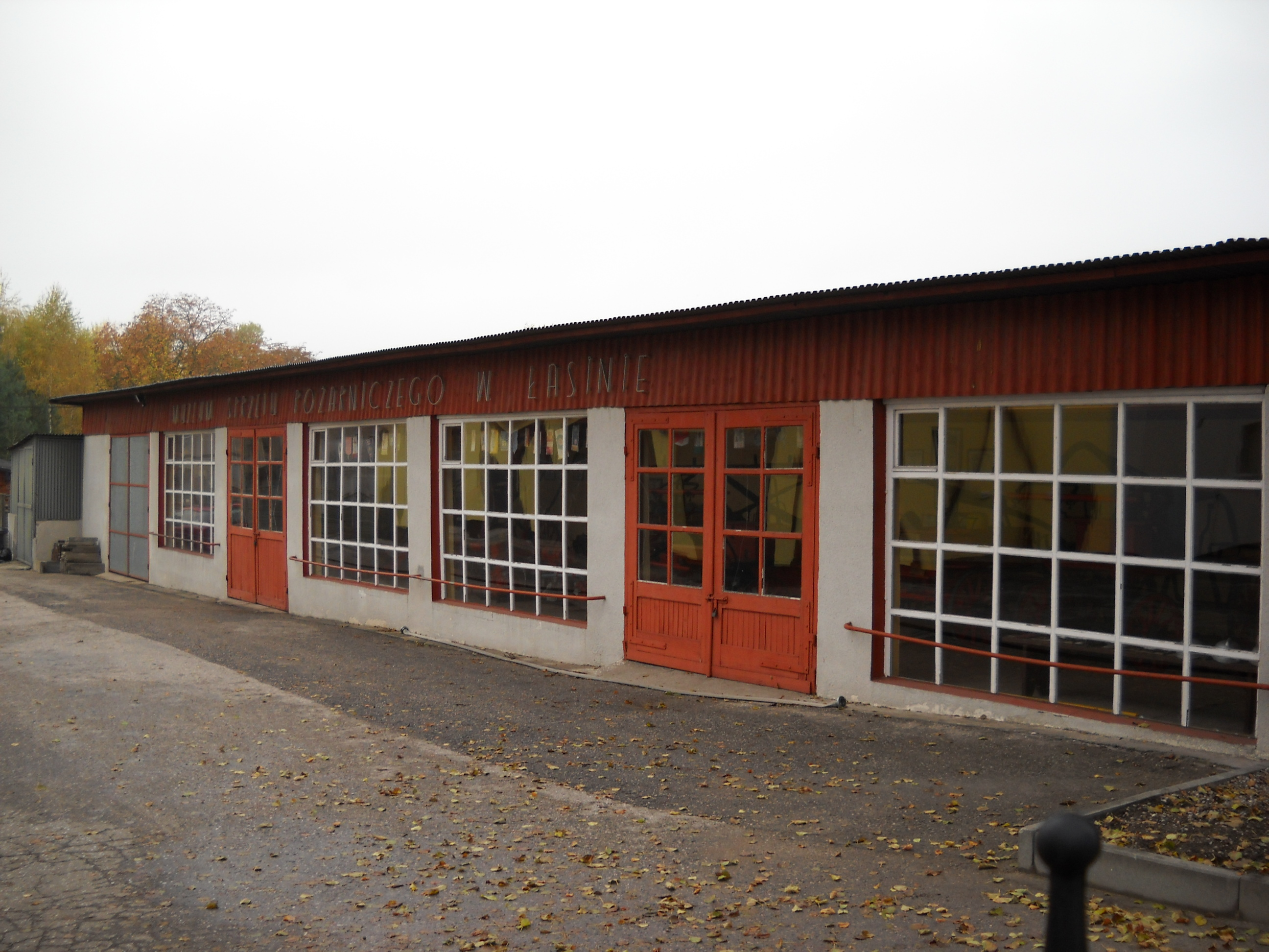 Muzeum Sprzętu Pożarniczego w Łasinie